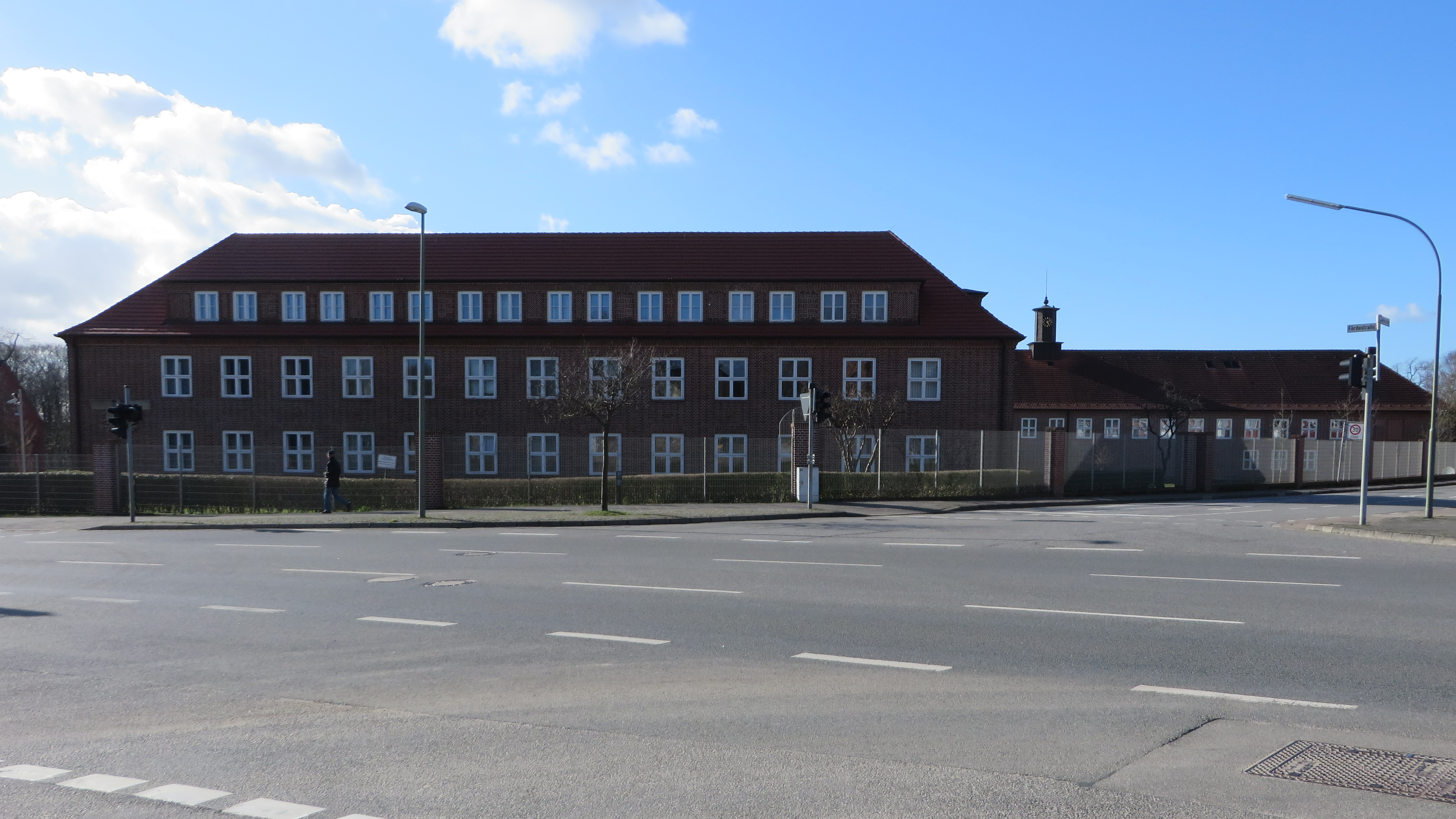 Marinesportschule (Flensburg-Mürwik April 2015), Bild 03